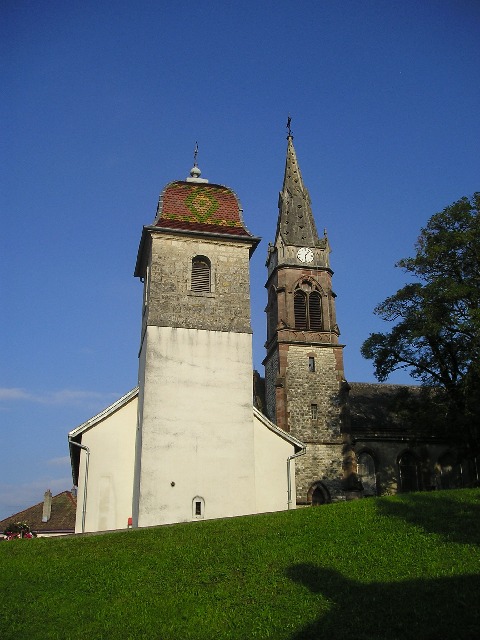 Türme der lutherischen Alten Kirche (Vieille église; links) und der neuen lutherischen Kirche (Temple luthérien; rechts) in Seloncourt